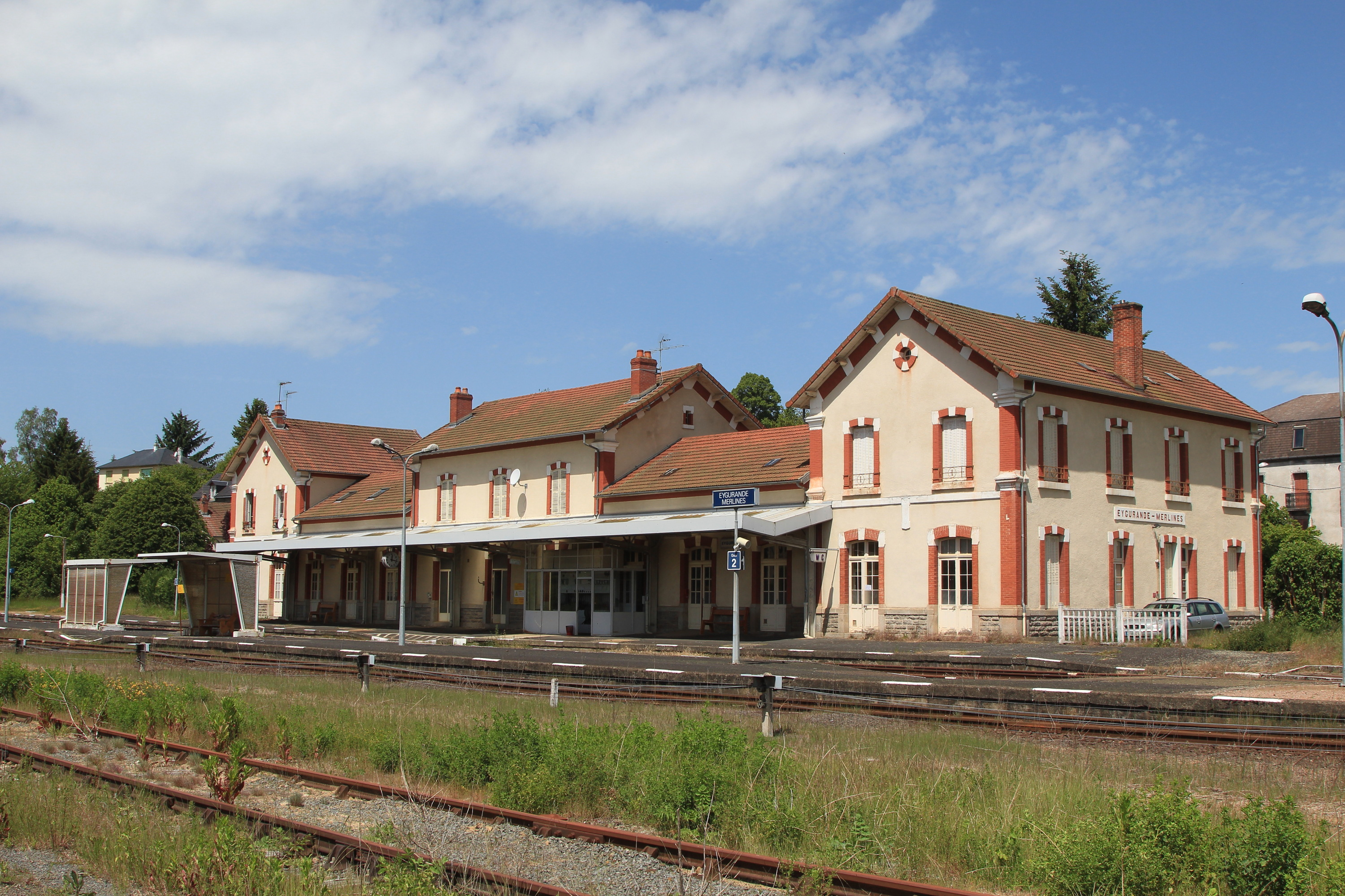 Le bâtiment voyageurs de la gare d'Eygurande - Merlines vu des voies.